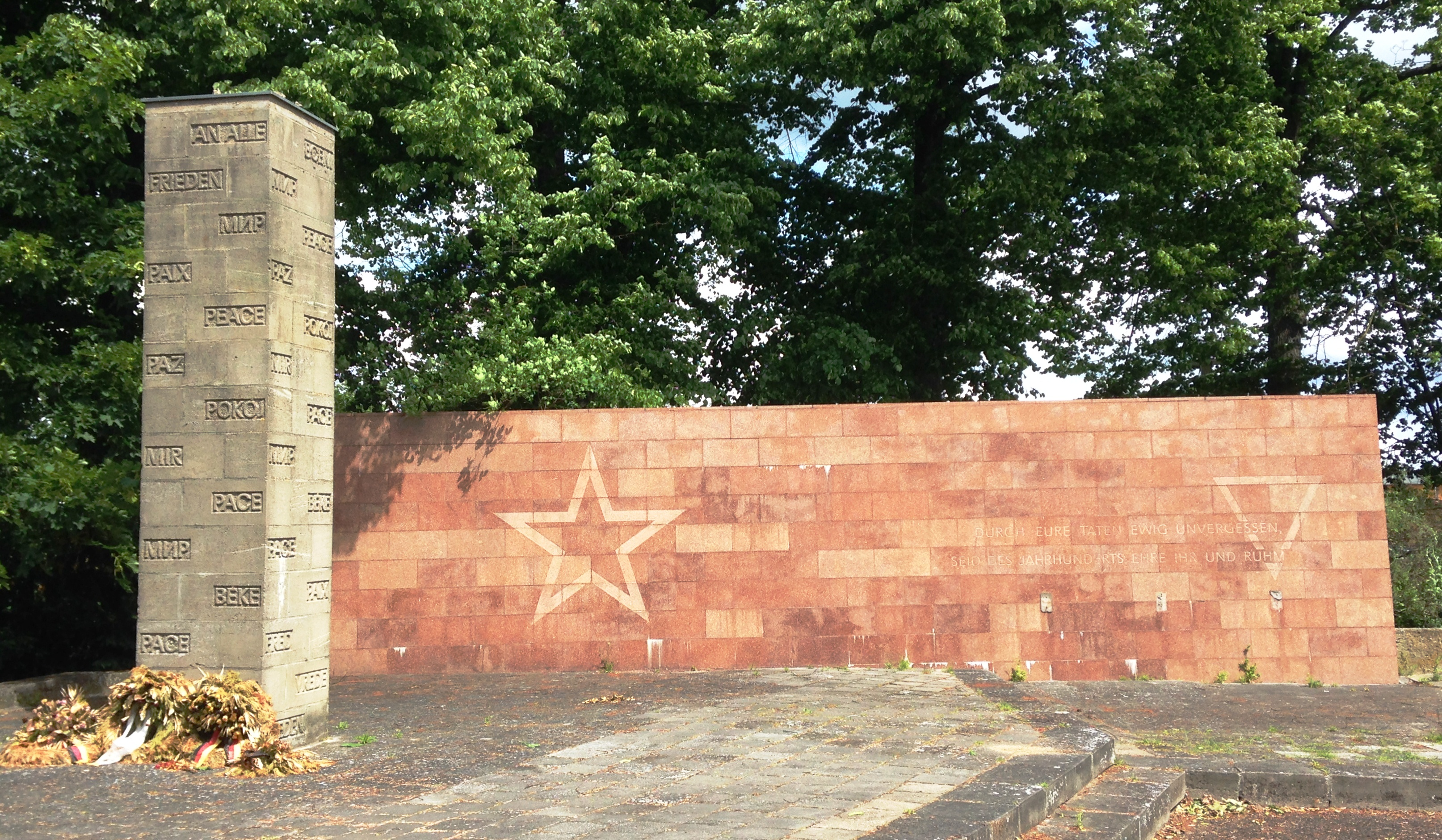 anlässlich Lenins 100. Geburtstag wurde 1970 der Grundstein für den Leninhain und die Gedenkstätte mit Friedenssäule und der roten Gedenkwand für die Opfer des Faschismusses errichtet. Inschrift: "DURCH EURE TATEN EWIG UNVERGESSEN, SEID DES JAHRHUNDERTS EHRE IHR UND RUHM"